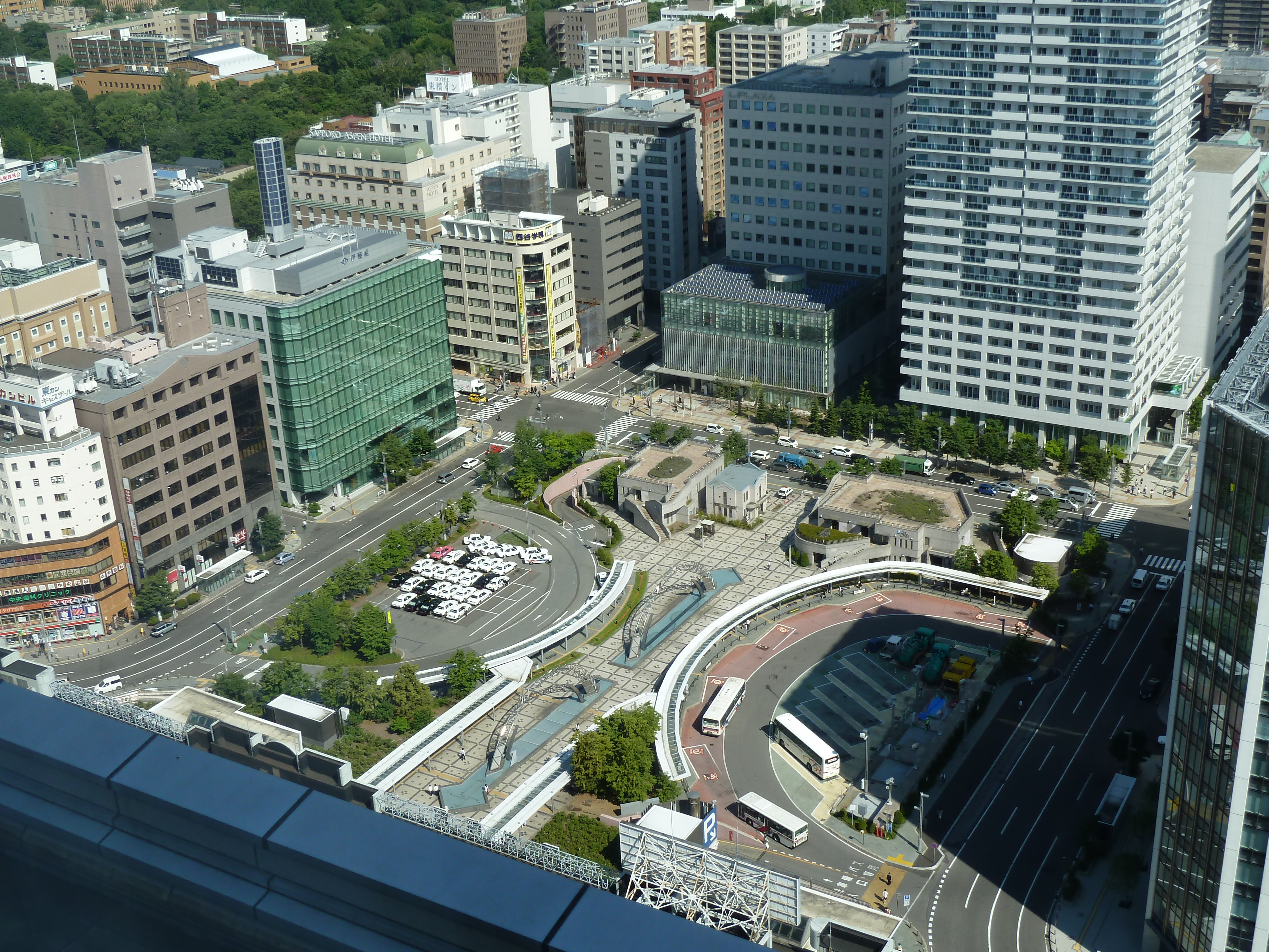 札幌駅北口広場